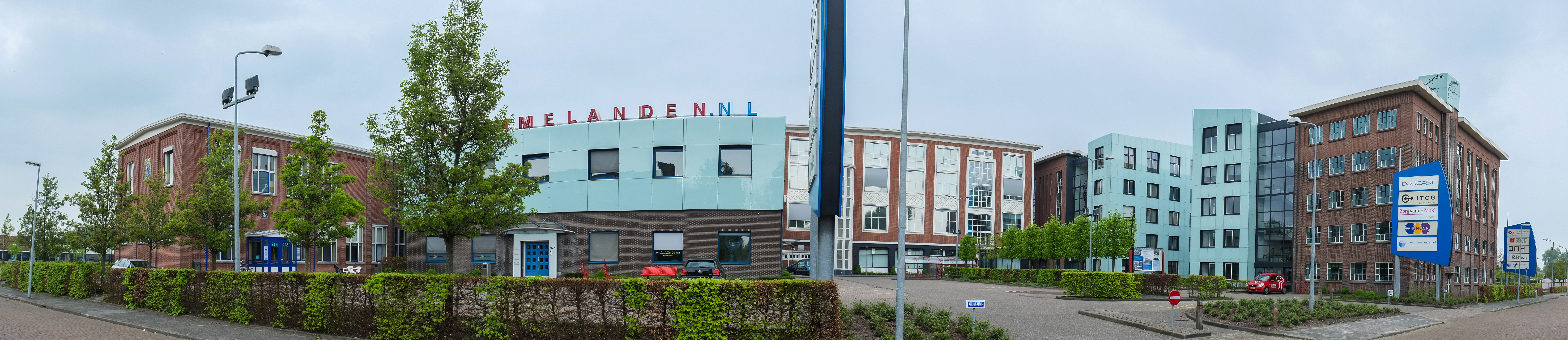 Friesestraatweg 215